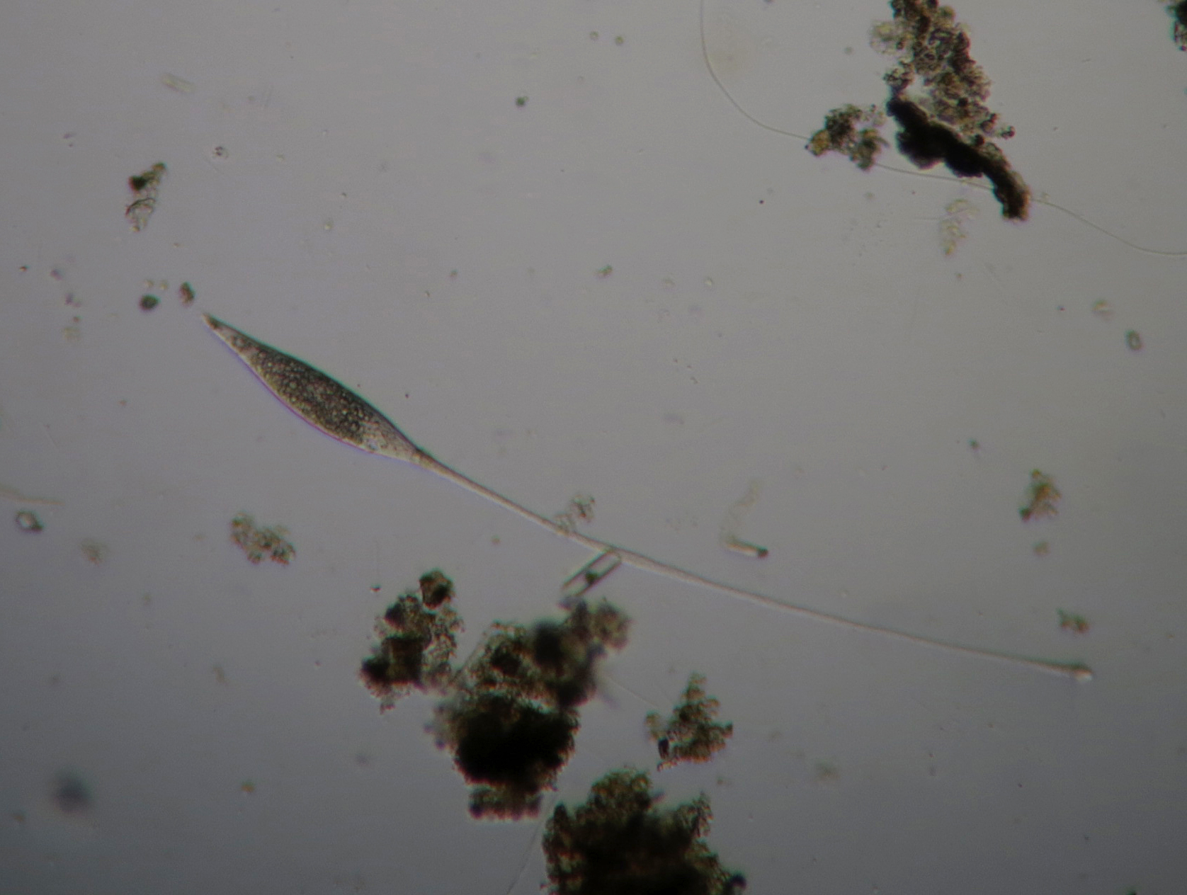 100x siehe nächstes Bild. Der "Hals ist hier sehr weit gedehnt, es geht auch tatsächlich noch weiter.